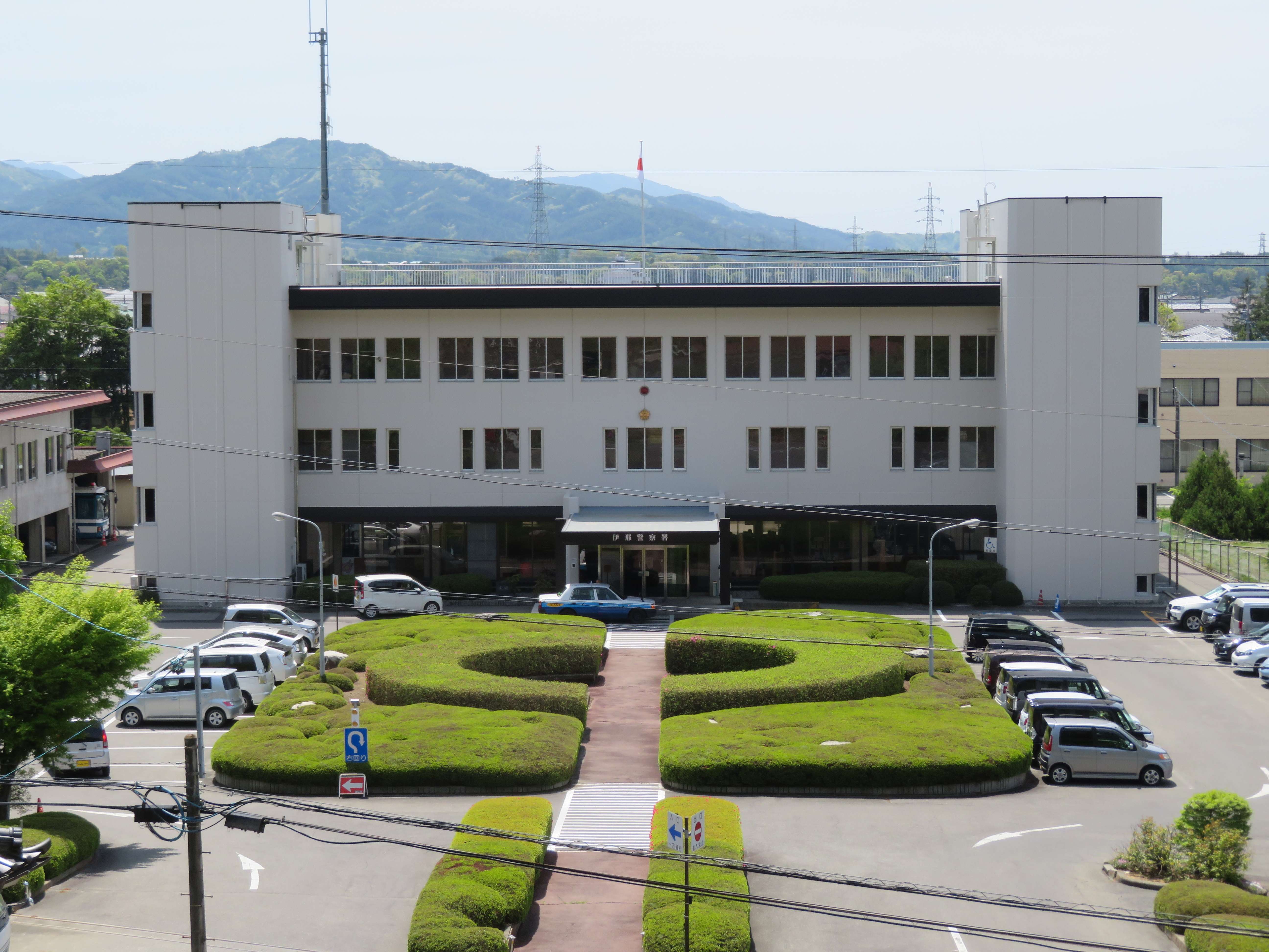 長野県警察伊那警察署庁舎 Canon PowerShot SX720 HS